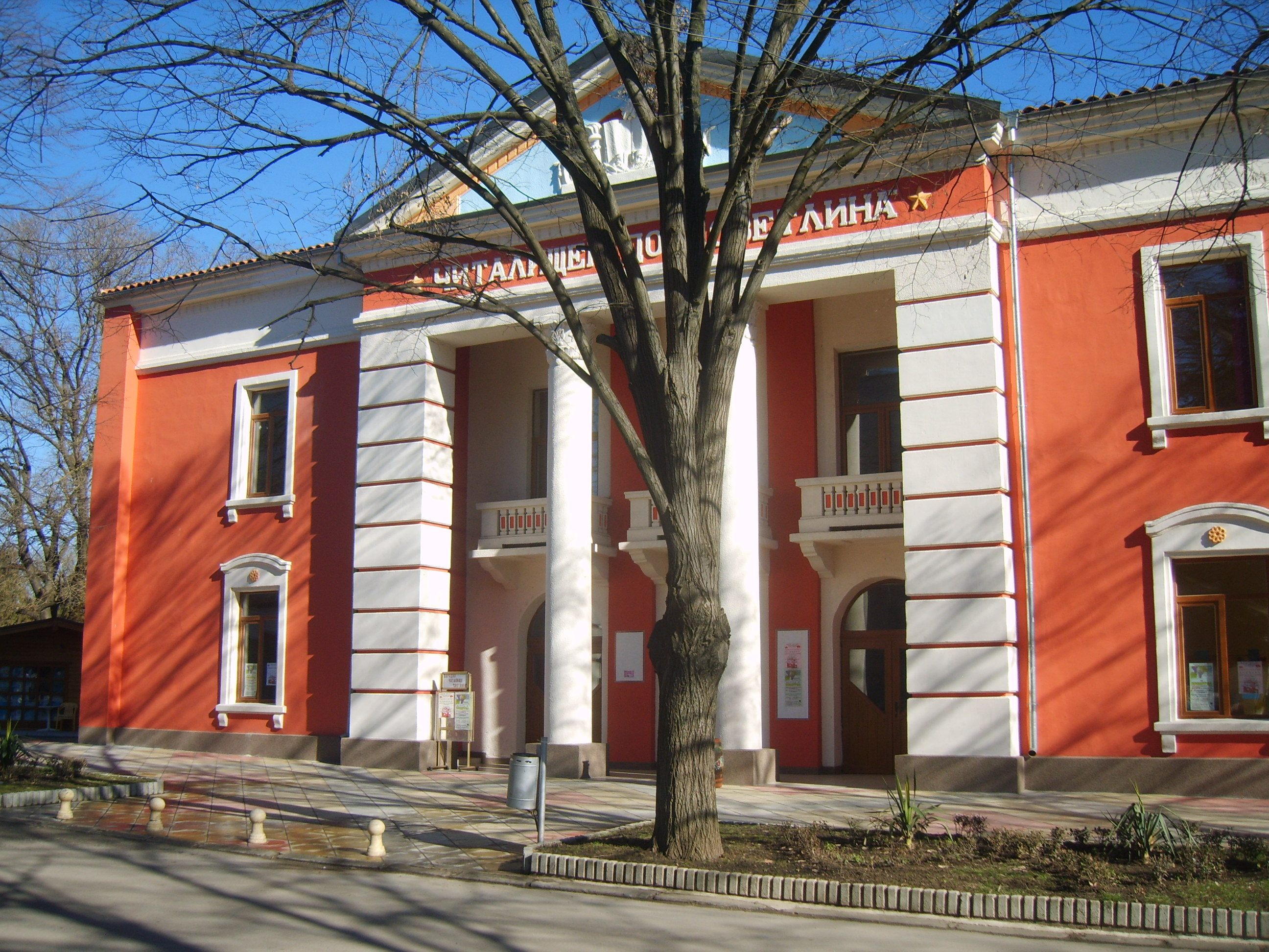 Читалищен дом "Светлина"